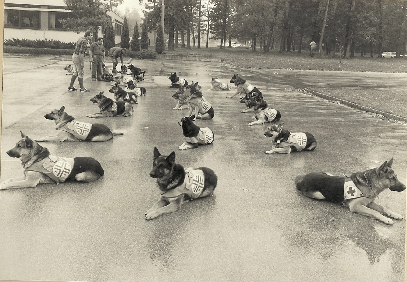 Hunde der ÖRHB bei der Ausbildung 1981